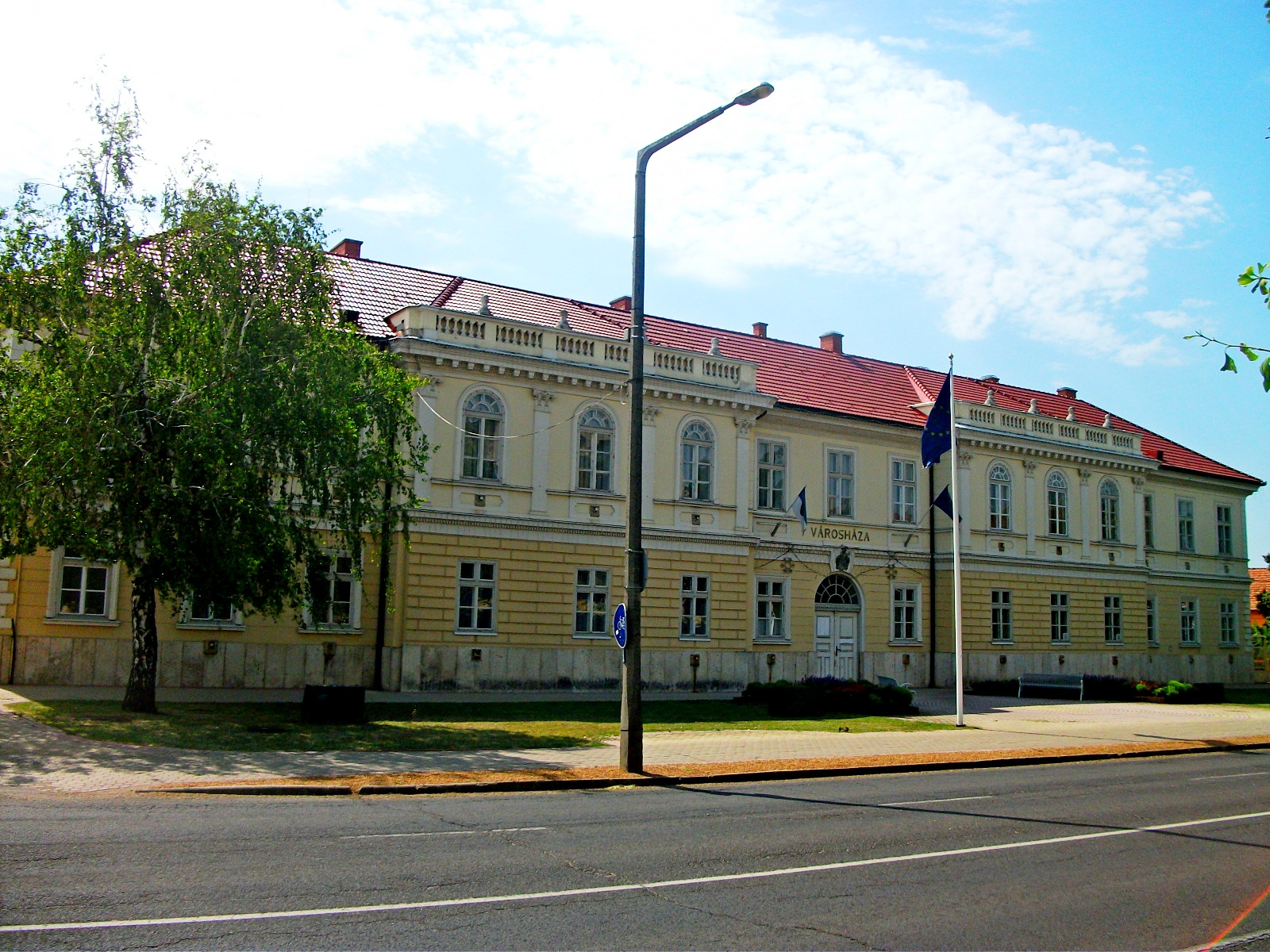 A hajdúszoboszlói városháza.